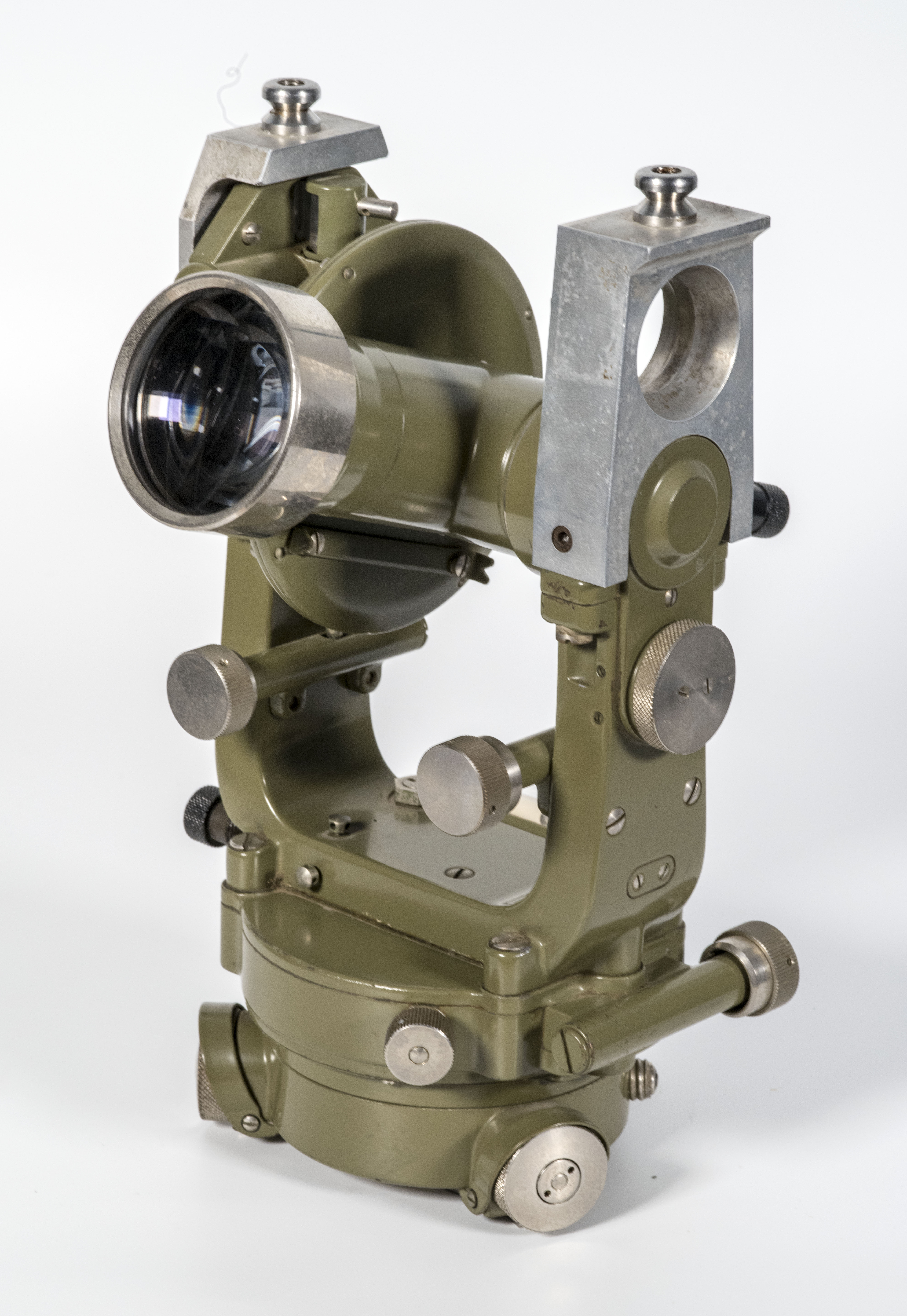 Instrumento de la colección del Centro Universitario de Mérida, Universidad de Extremadura, España.